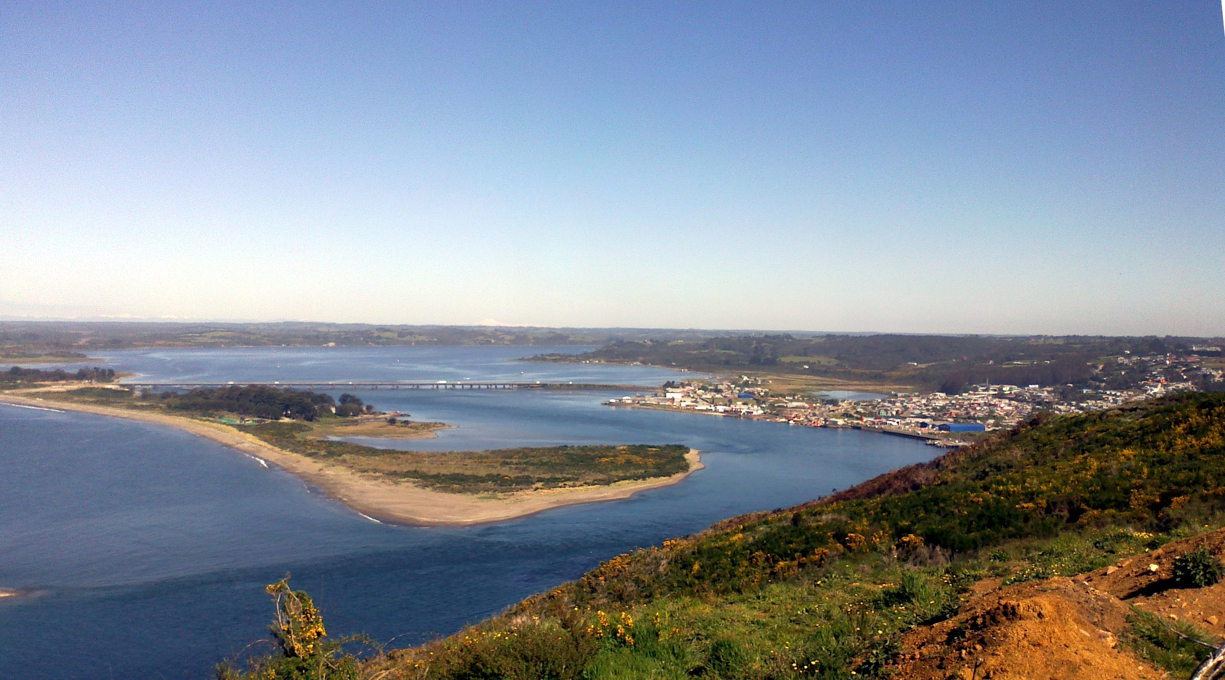 Desembocadura del río Pudeto, punta Purranqui o Pasaje y parte de Ancud desde el cerro Huaihuén, Ancud, Chile.